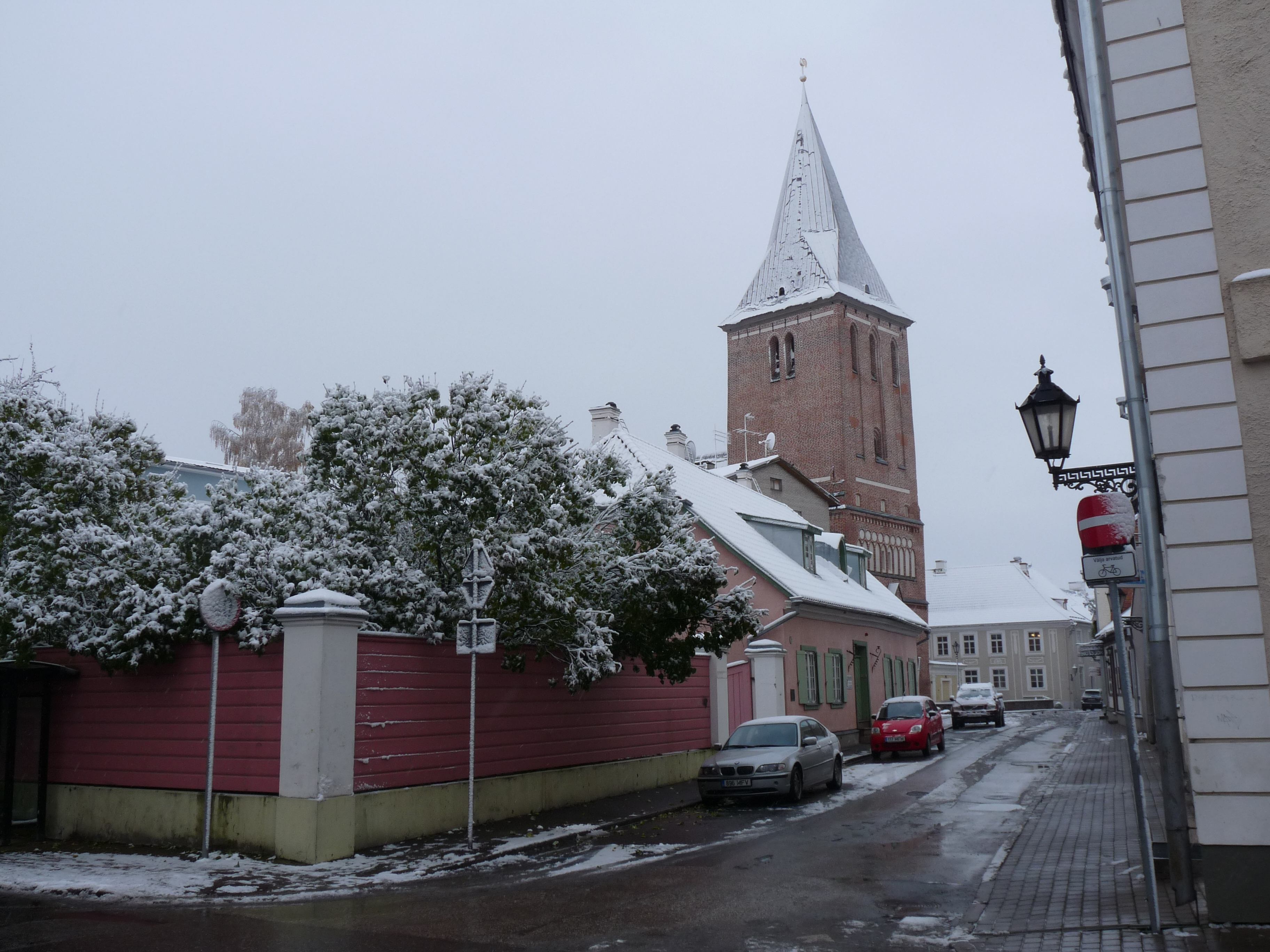 Uppsala maja ning Jaani kirik Tartus Jaani tänaval esimese lumega, 26. oktoober 2012